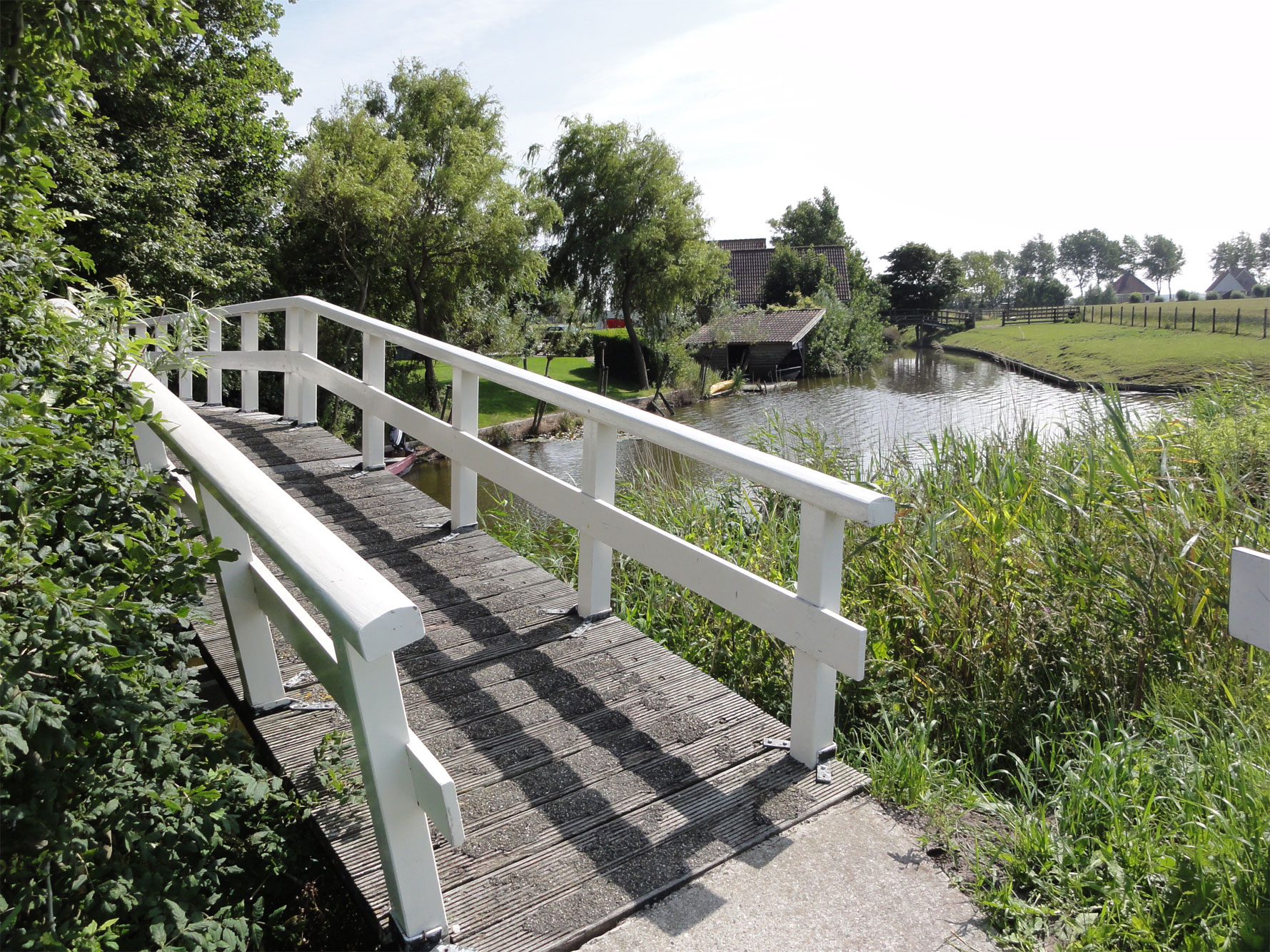 Brug over de Sexbierumervaart bij Wijnaldum